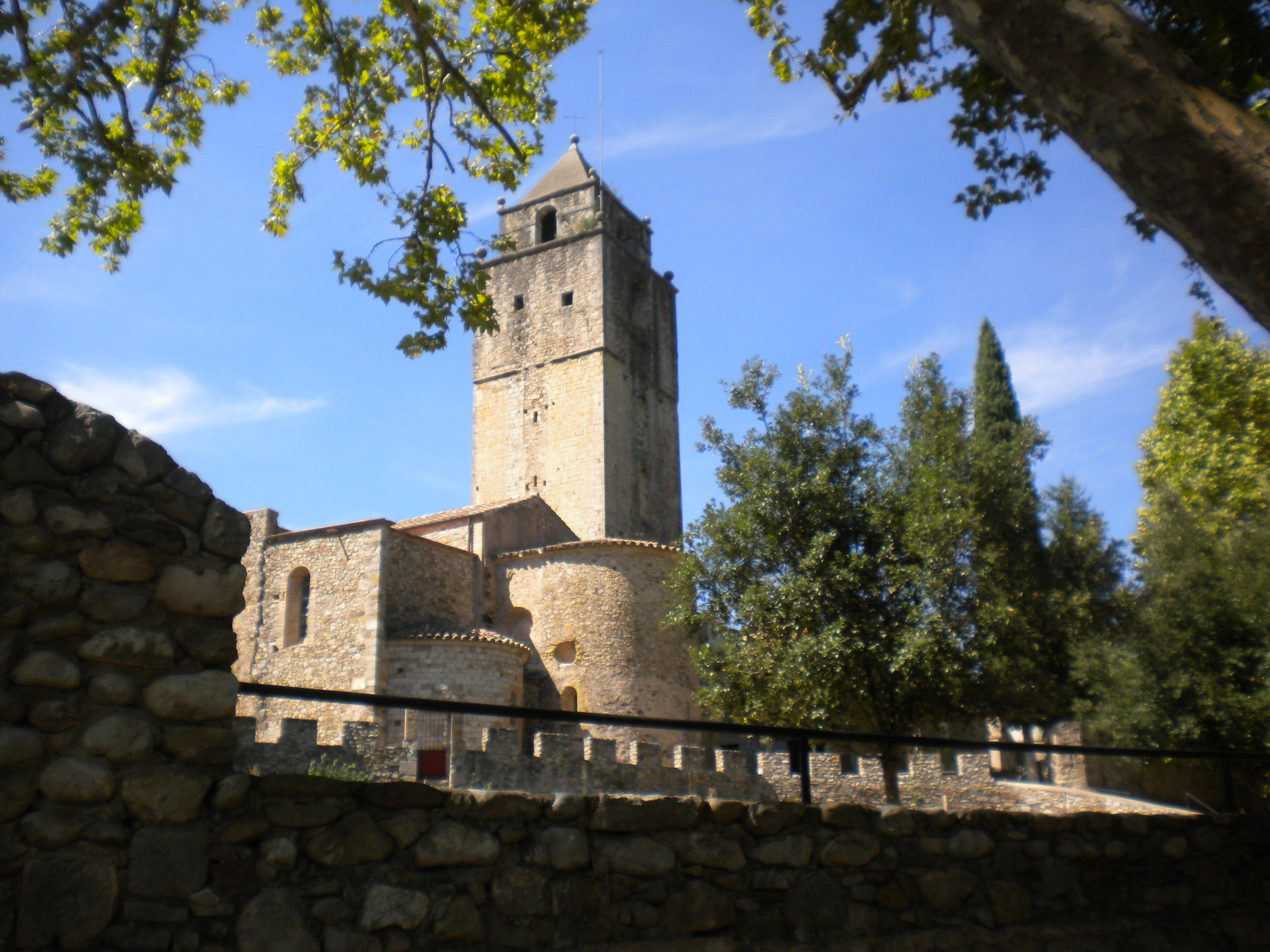 Església romànica de Sant Llorenç, al nucli de Sant Llorenç de la Muga (Alt Empordà).